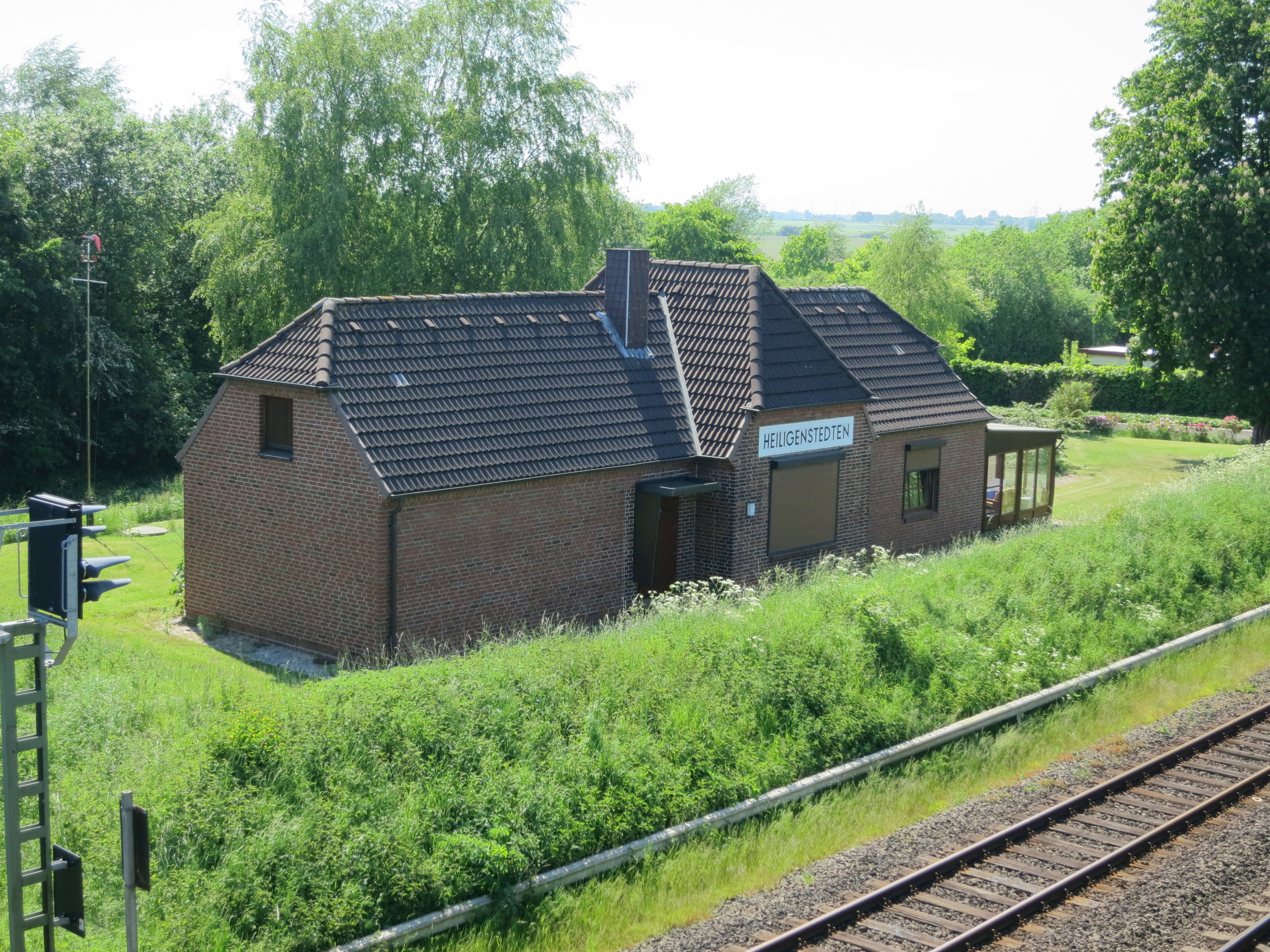 Der ehemalige Bahnhof Heiligenstedten an der Marschbahnstrecke mit dem früheren Bahnhofsgebäude